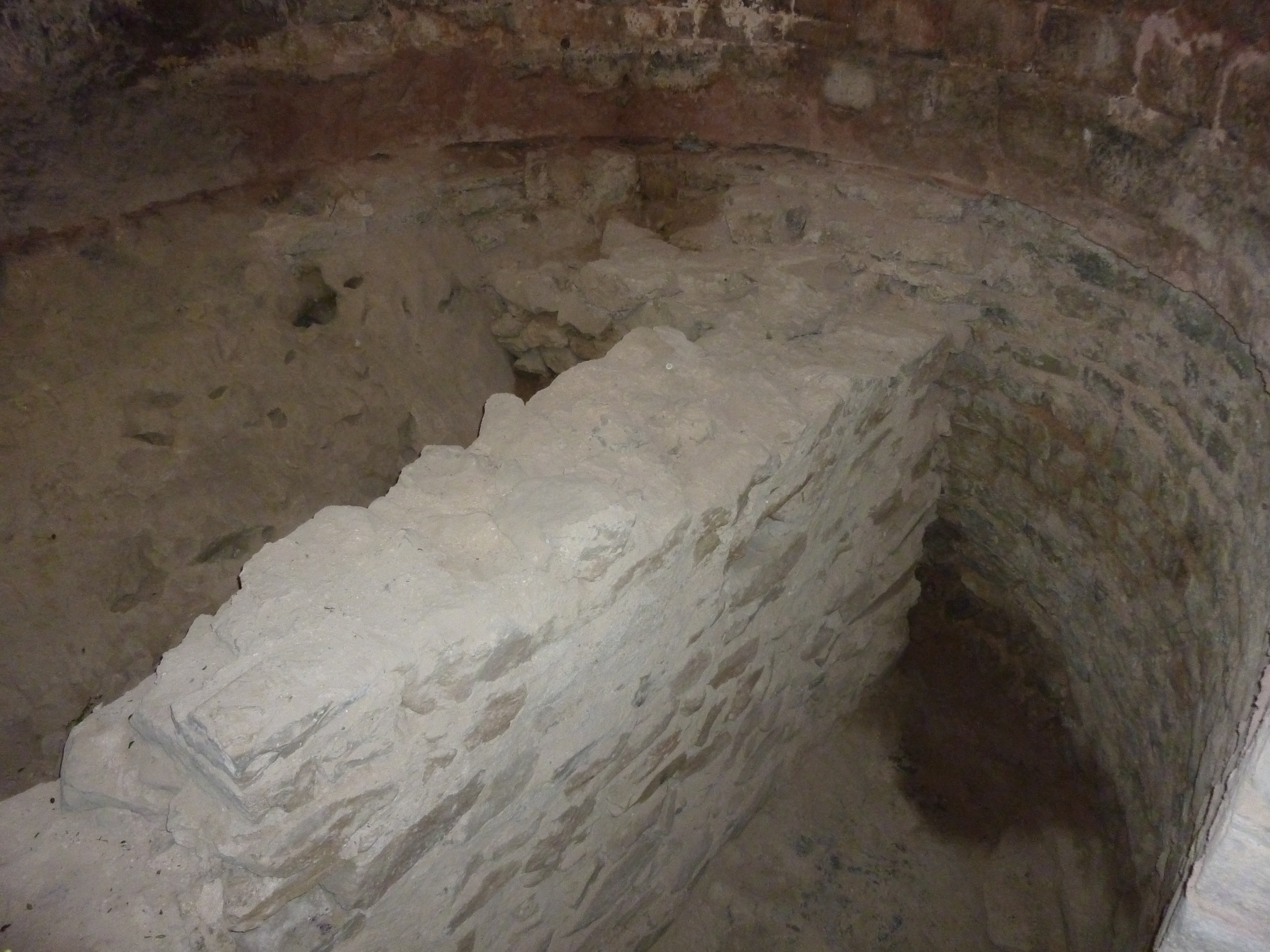 Detalle del muro de los cimientos del antiguo Castillo de Madrona, aparecido en junio 2010.